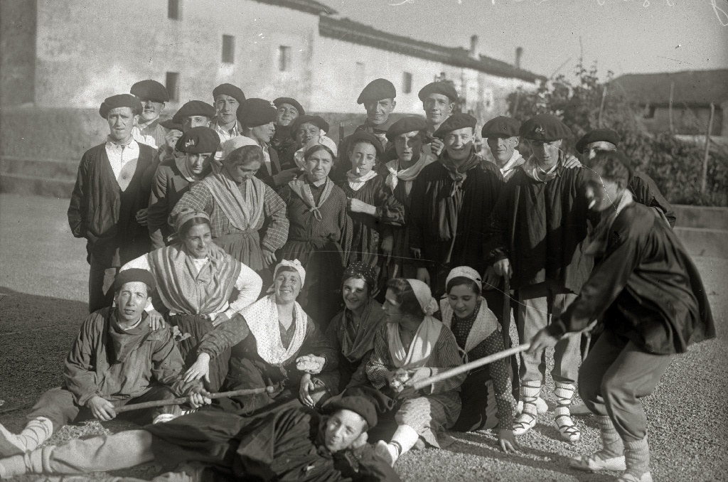 Título original: Jóvenes con trajes vascos en Zubieta (1/3) Localización: San Sebastián (Guipúzcoa)